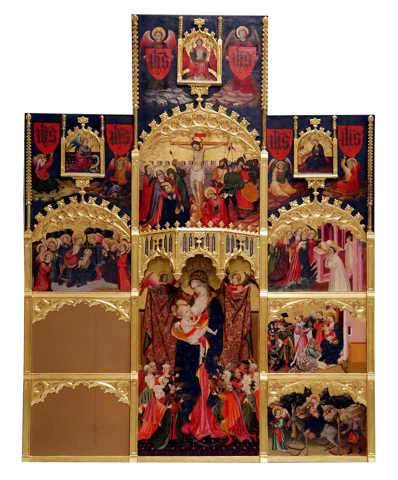 Esta obra, conocida como el Retablo de la Virgen de la Leche, procede del convento de Santo Domingo de Valencia.